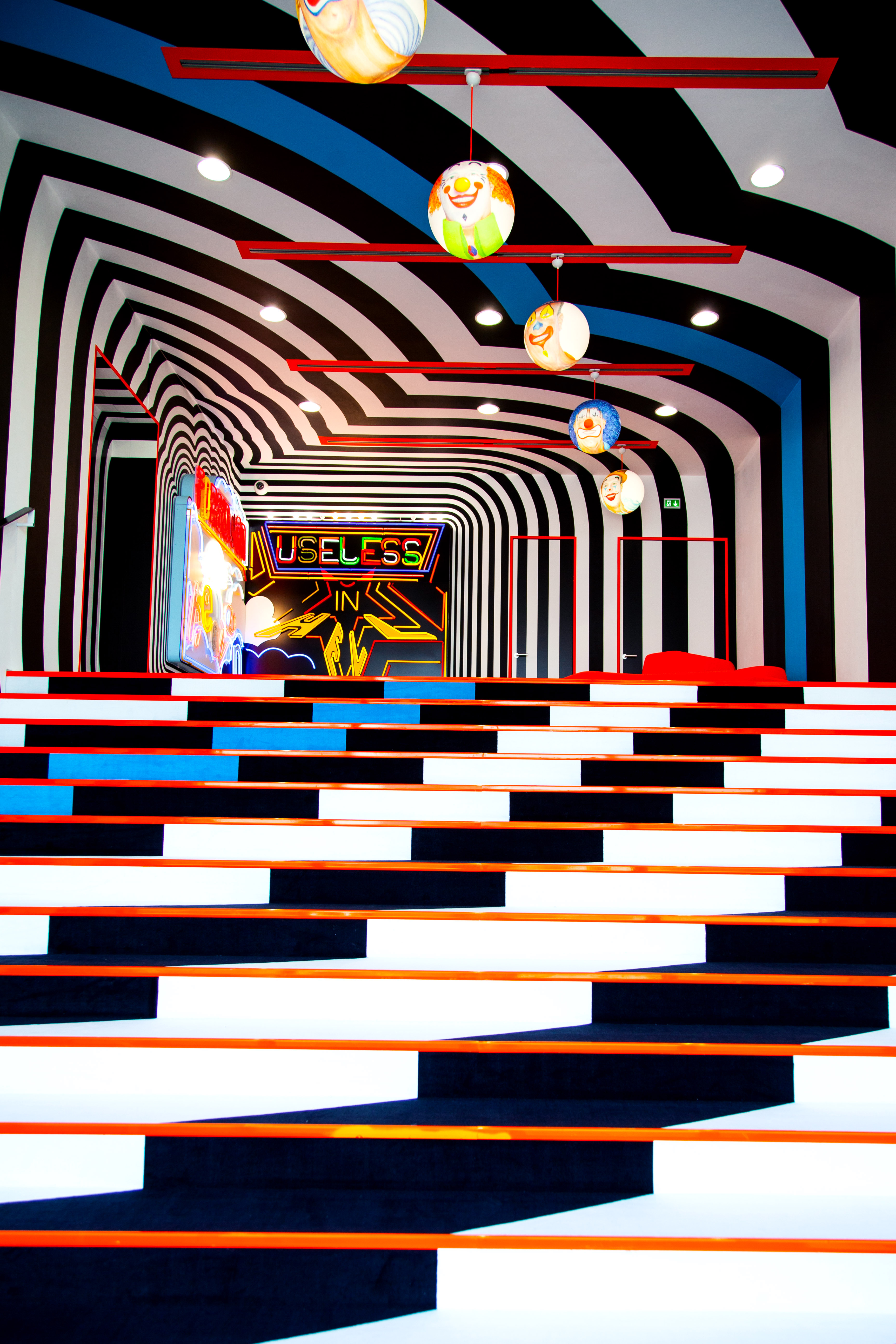 Eingangsbereich der Firma Jarltech in Usingen, realisiert von Tobias Rehberger